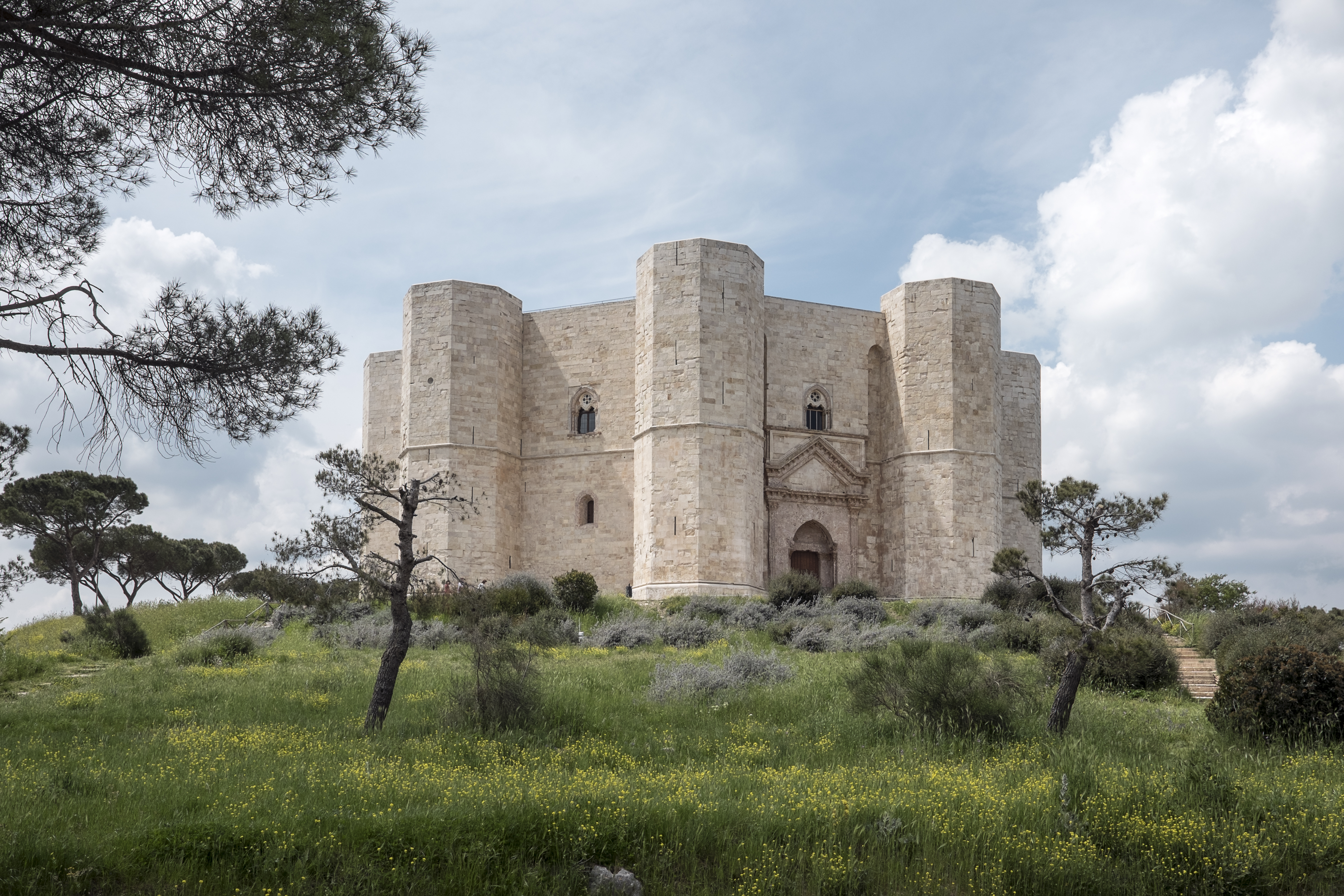 Castel del Monte, Andria